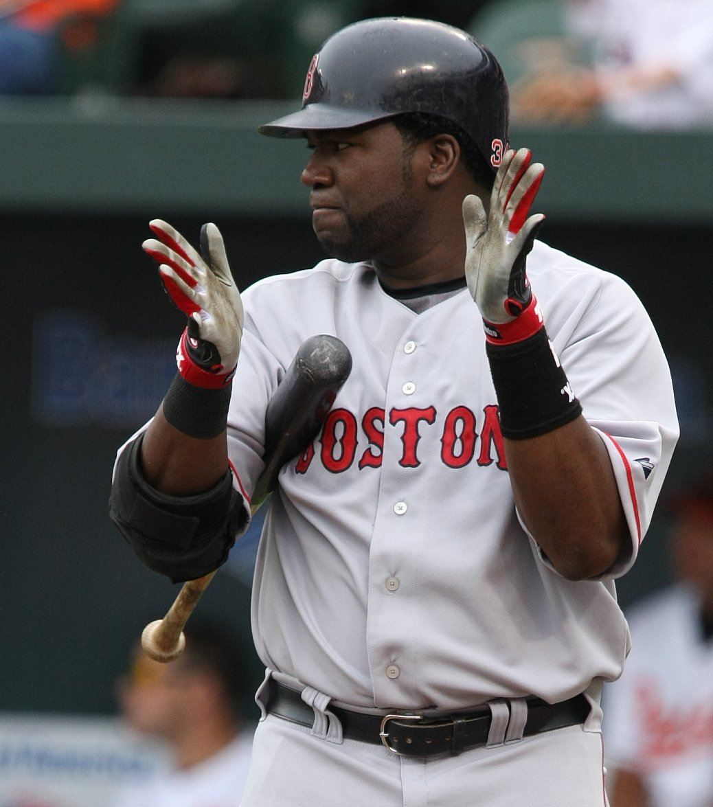 David Ortiz en 2008.